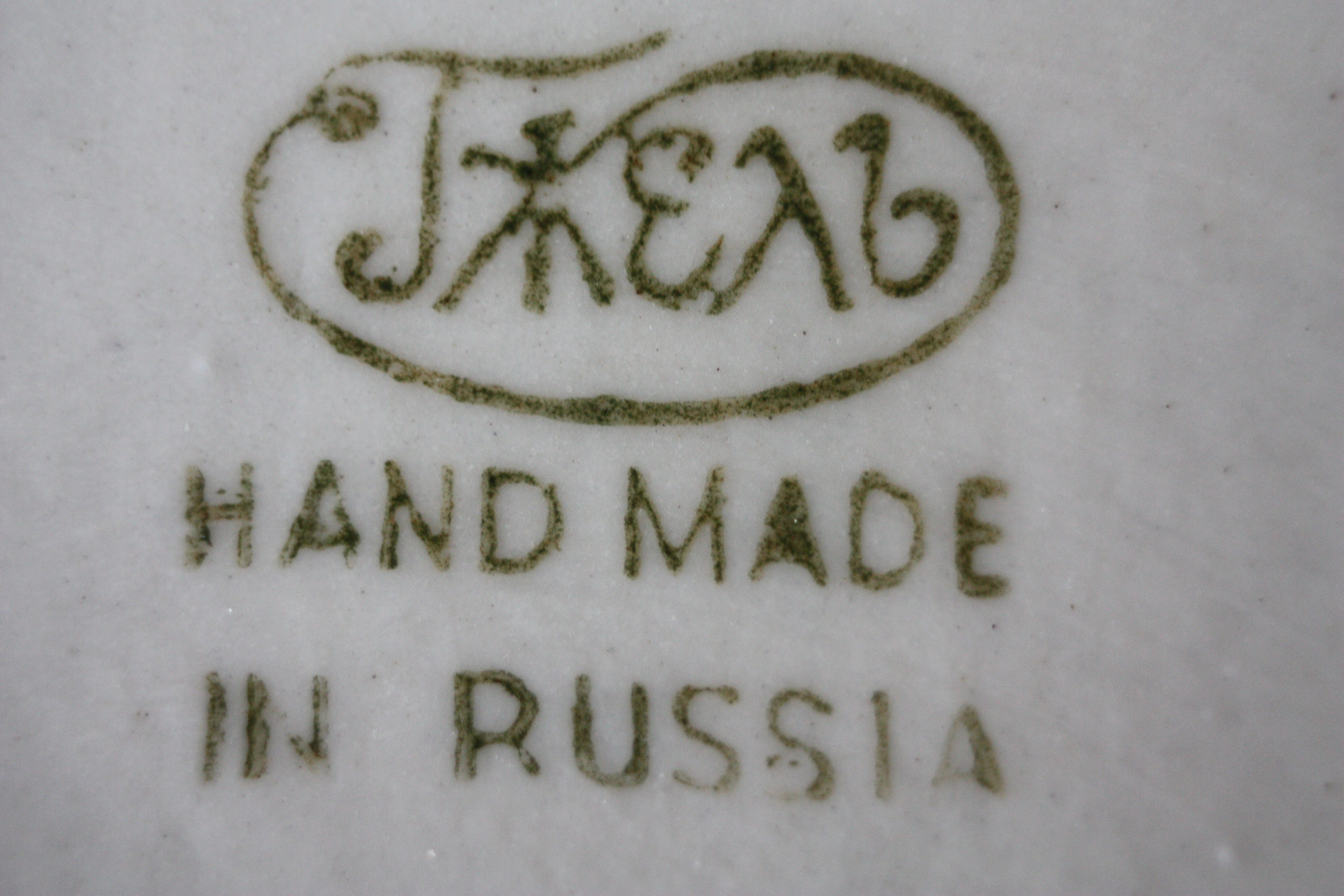 Gschel, Keramik, Russland